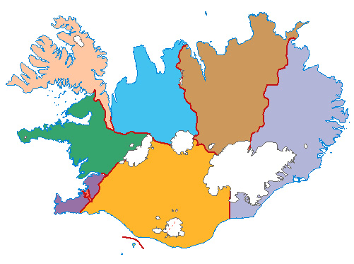 Islanda. Confini dei distretti elettorali fino al 2003, oggi distretti giurisdizionali. Fonte: che ha la seguente nota: The following maps may be used at your discretion and do not require special permission from the National Land Survey of Iceland. Vedasi anche